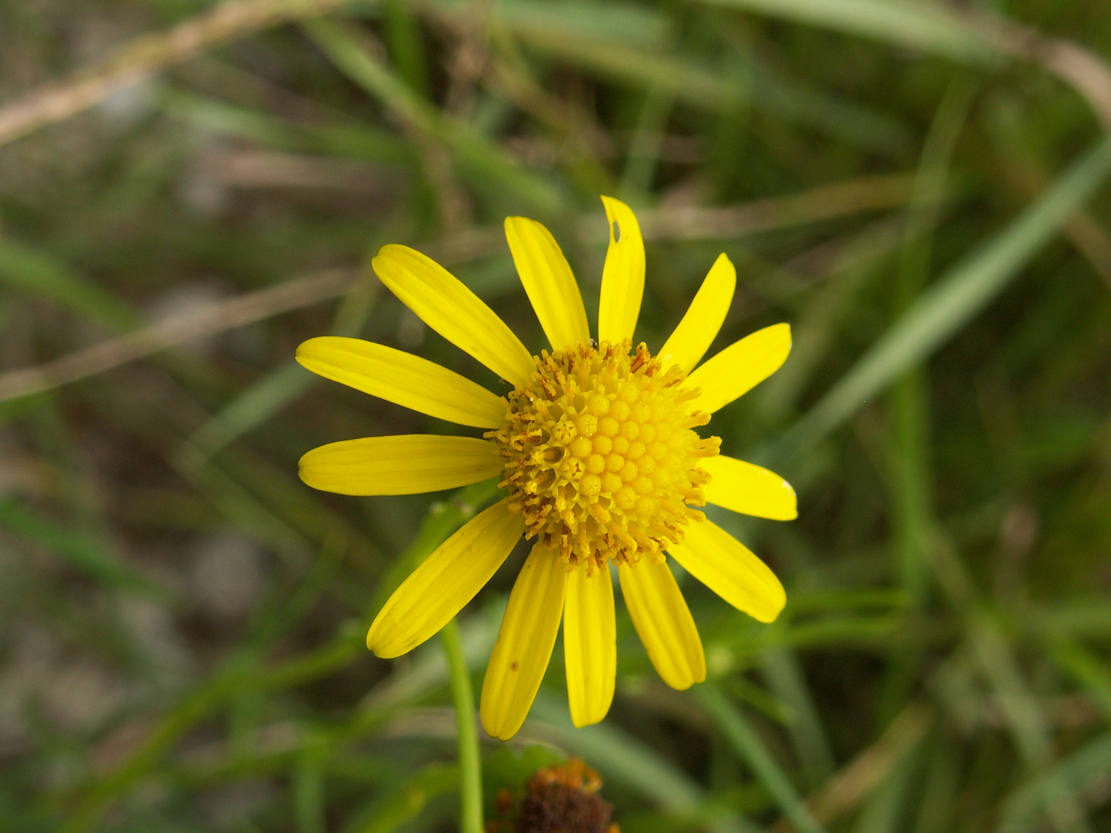 Senecio inaequidens